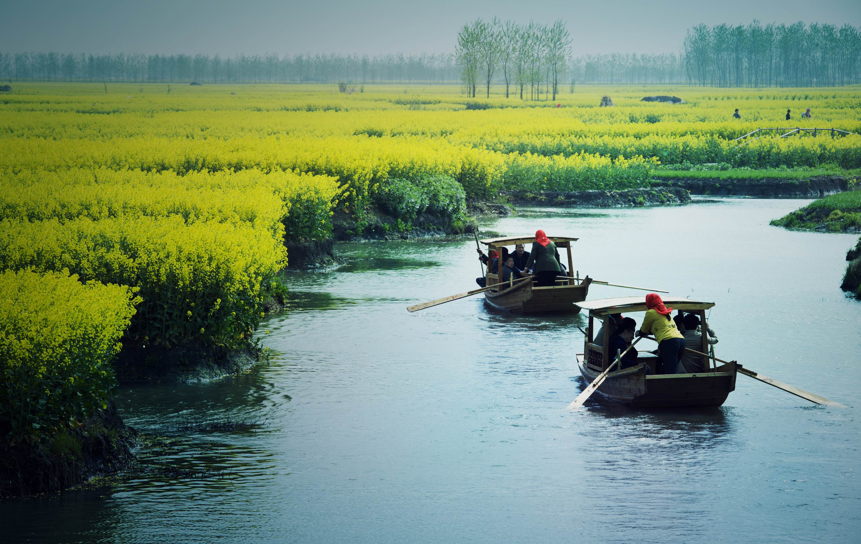 兴化垛田，全球重要农业文化遗产，江苏省文物保护单位